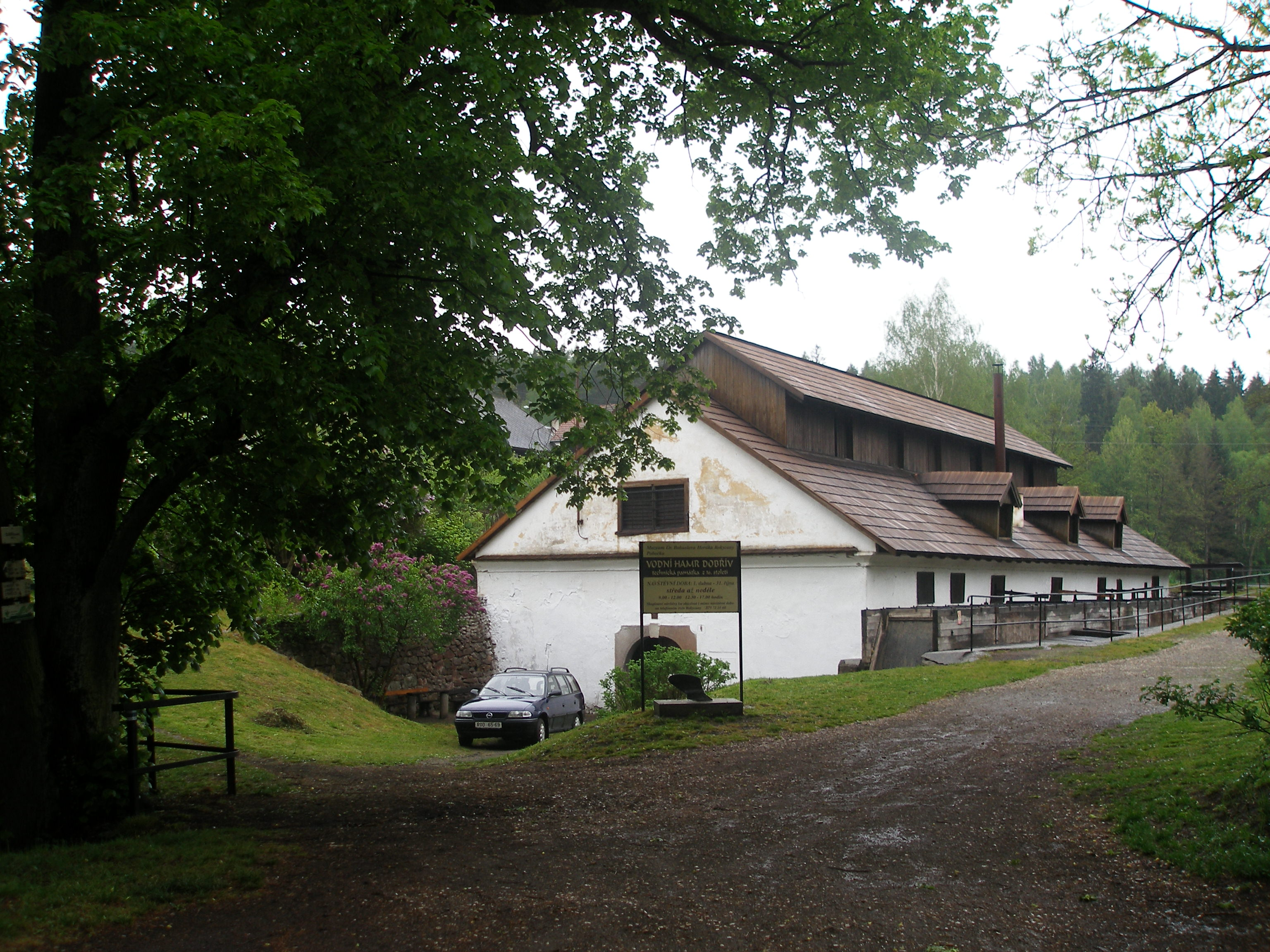 Vodní hamr Dobřív